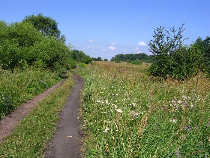 Wypaleniska w Dąbrowie Górniczej